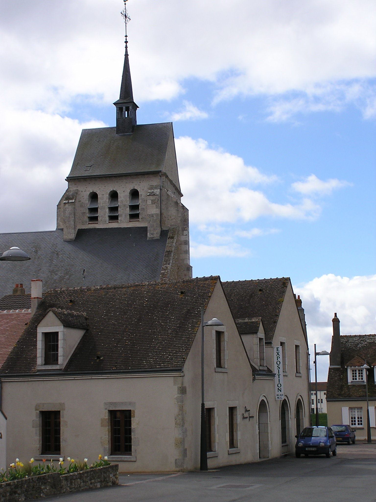 vue de la Place du cloître de St Denis de l'Hôtel, désignant l'emplacement du musée MG